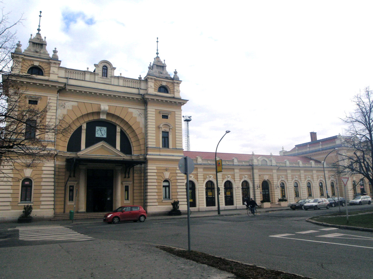 Hauptbahnhof in Steinamanger